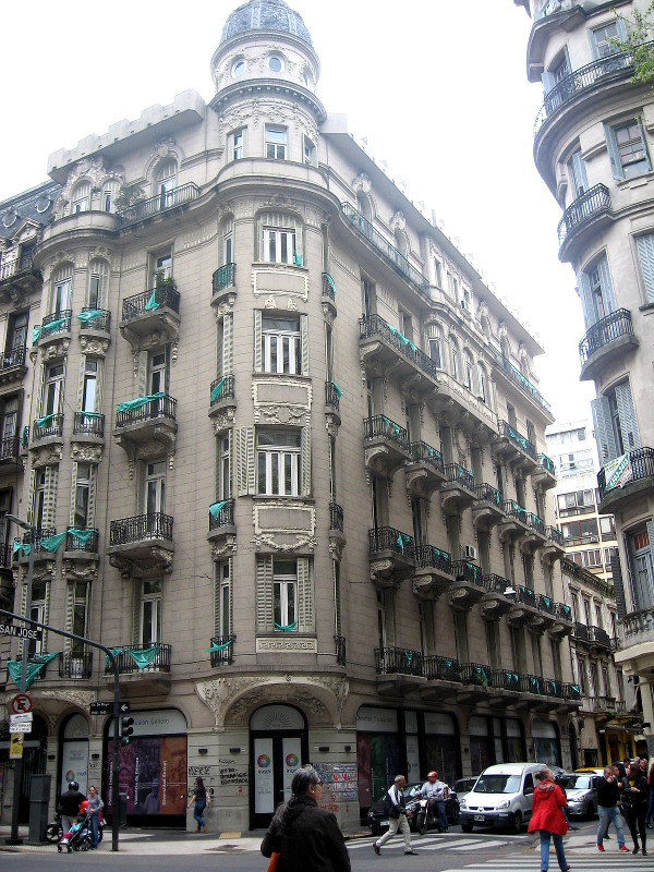 Pañuelos verdes en los balcones de un edificio en la zona céntrica de la ciudad de Buenos Aires.